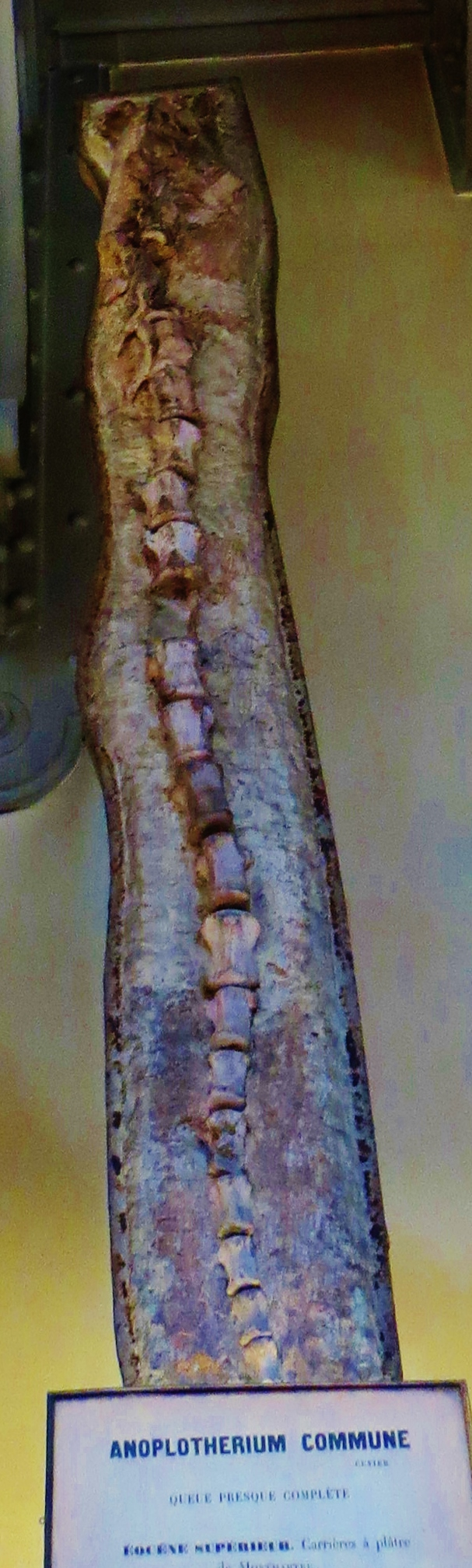 Fossil of Anoplotherium, an extinct mammal - Took the photo at Museum Histoire Naturelle, Paris